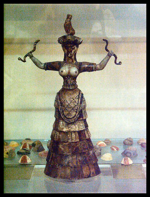 So genannte kleine Schlangengöttin aus Fayence aus der kultischen Schatzkammer des Heiligtums des Palastes von Knossós, ca. 1700-1450 v. Chr. Ort: Saal IV, Archäologisches Museum, Iraklio, Kreta